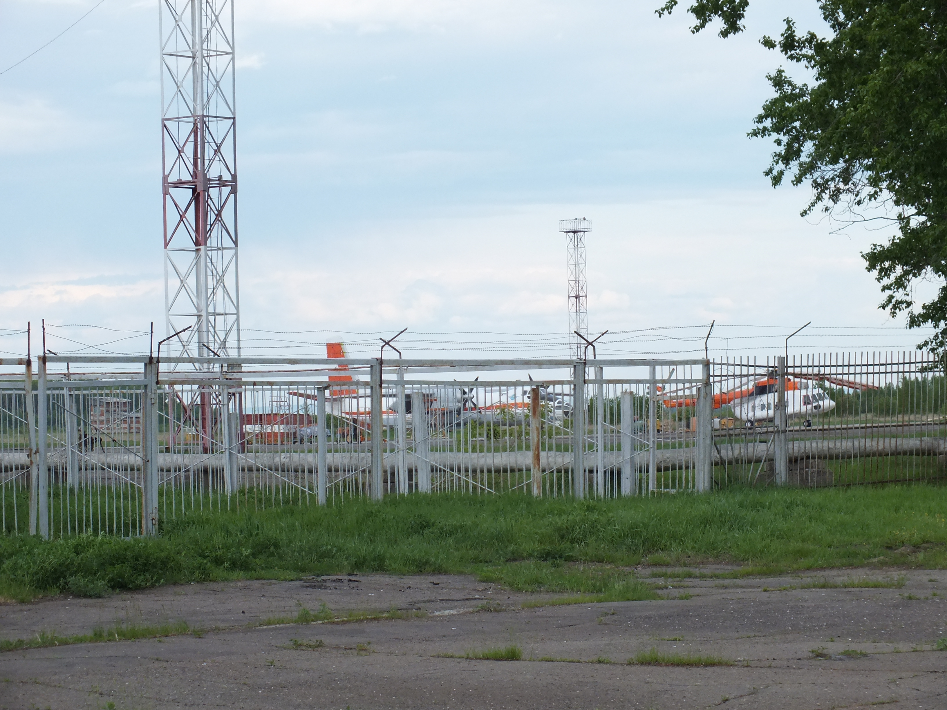 Аэропорт Хурба Комсомольский район